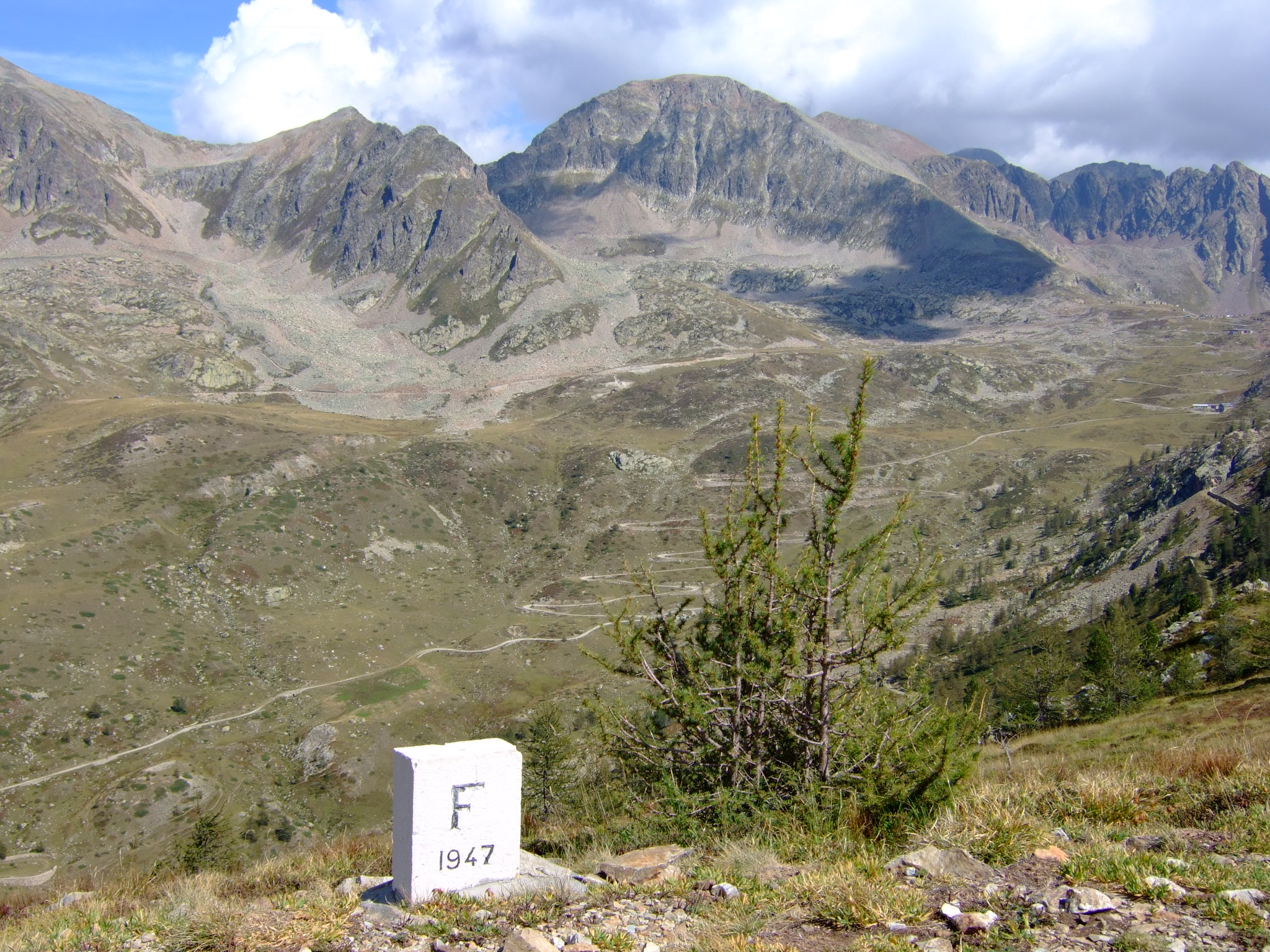 Blick von der französischen Grenze über die italienische Nordseite des Colle della Lombarda (der Pass ist Richtung Osten). Im Hintergrund Cima d'Orgials (2647 m, Italien) und Cime della Lombarde (2800 m, Grenze über den Kamm vom Pass).